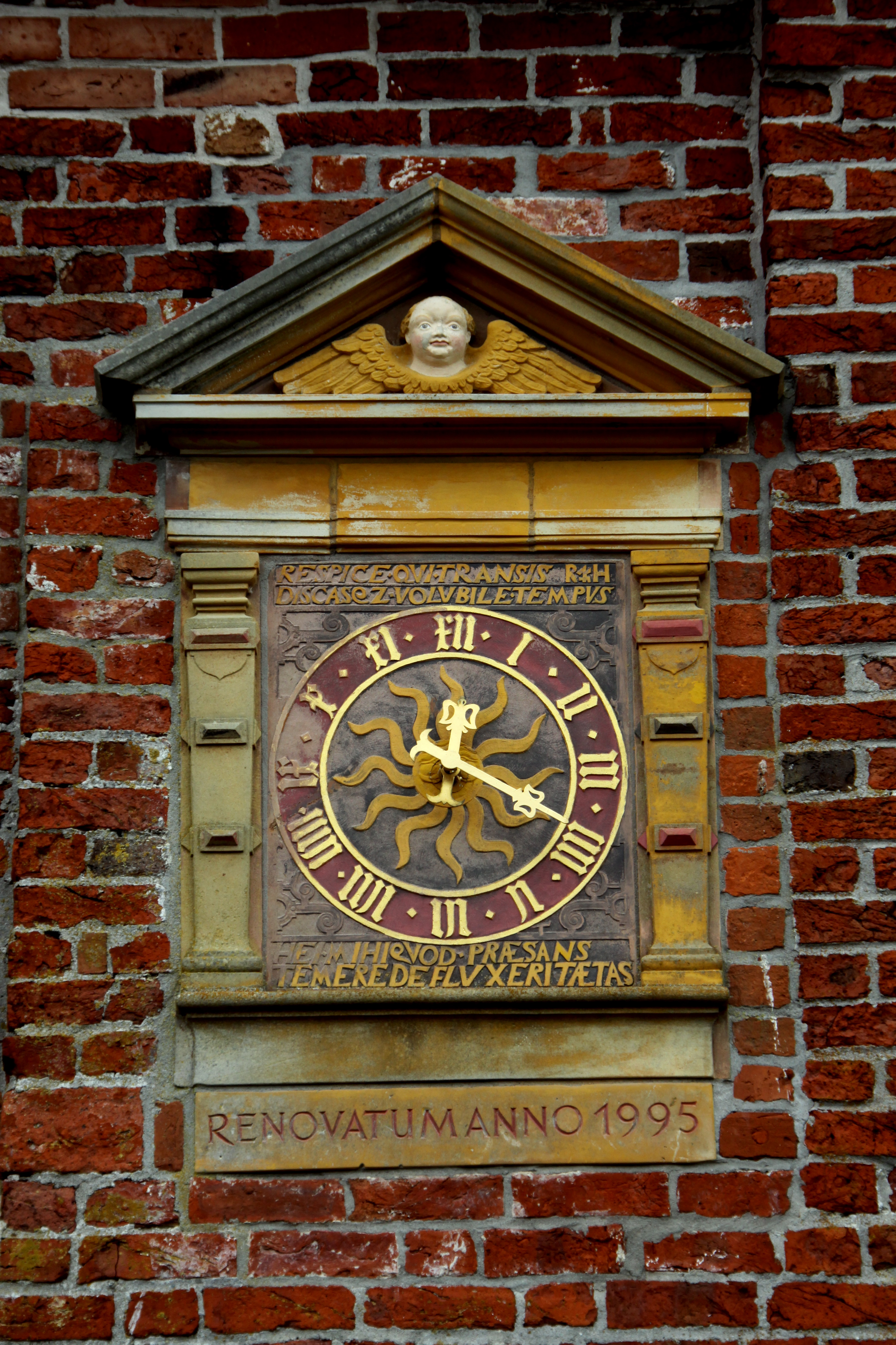 Sonnenuhr an der Kirche von Freepsum